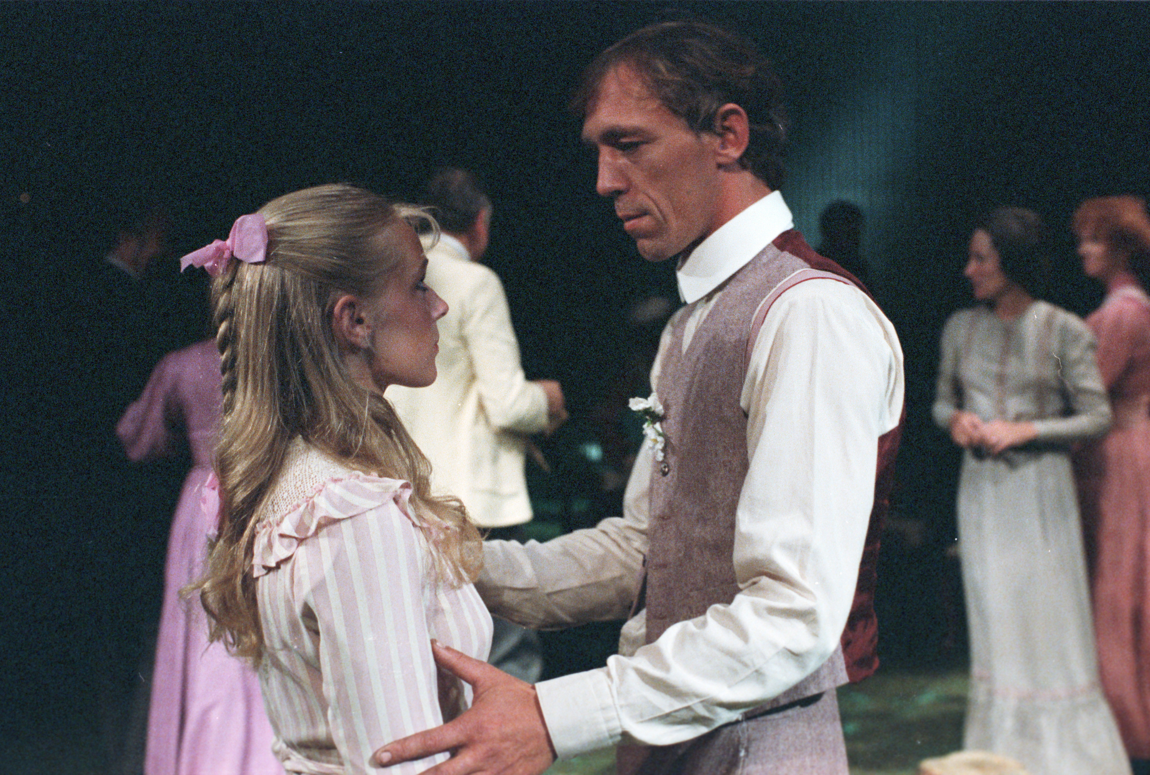 Scene fra Nationaltheaterets oppsetning av Henrik Ibsens "Kjærlighetens Komedie". Forestillingen hadde premiere 1. september 1980. Edith Roger hadde regi, og medvirkende var blant annet Merete Moen og Katja Medbøe som Svanhild og Svein Strula Hungnes som Falk. Oslo